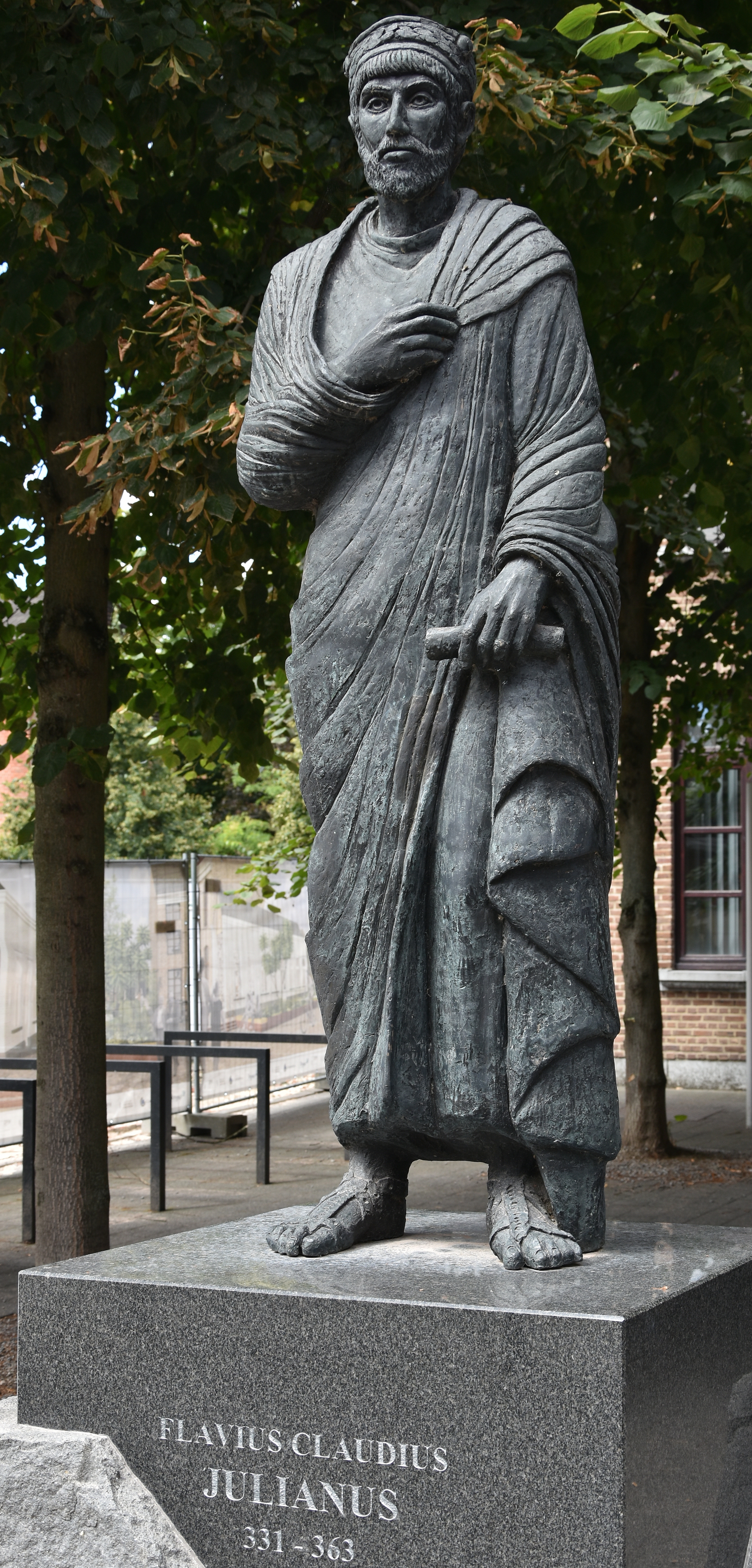 Flavius Claudius Julianus - Tongeren 10-08-2018 This photo of immovable heritage has been taken in the Flemish Region